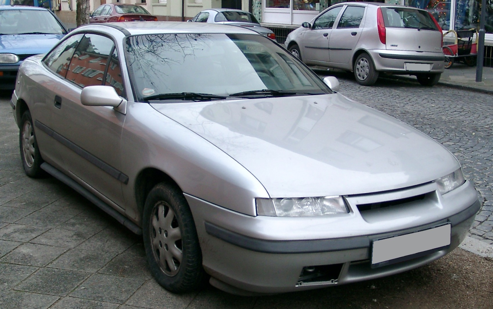 Opel Calibra A